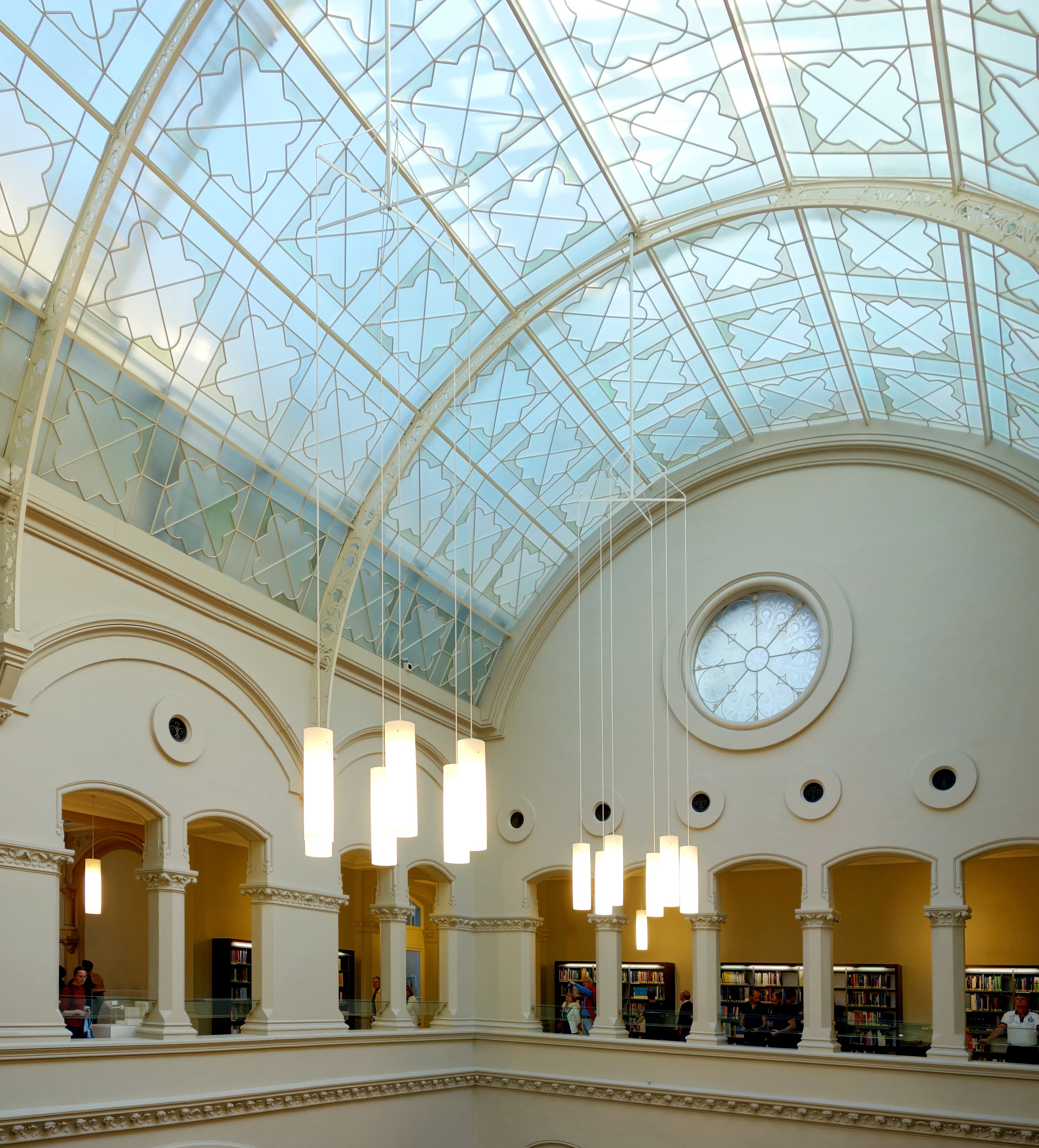 Verrière centrale de la bibliothèque de la Banque nationale de Belgique